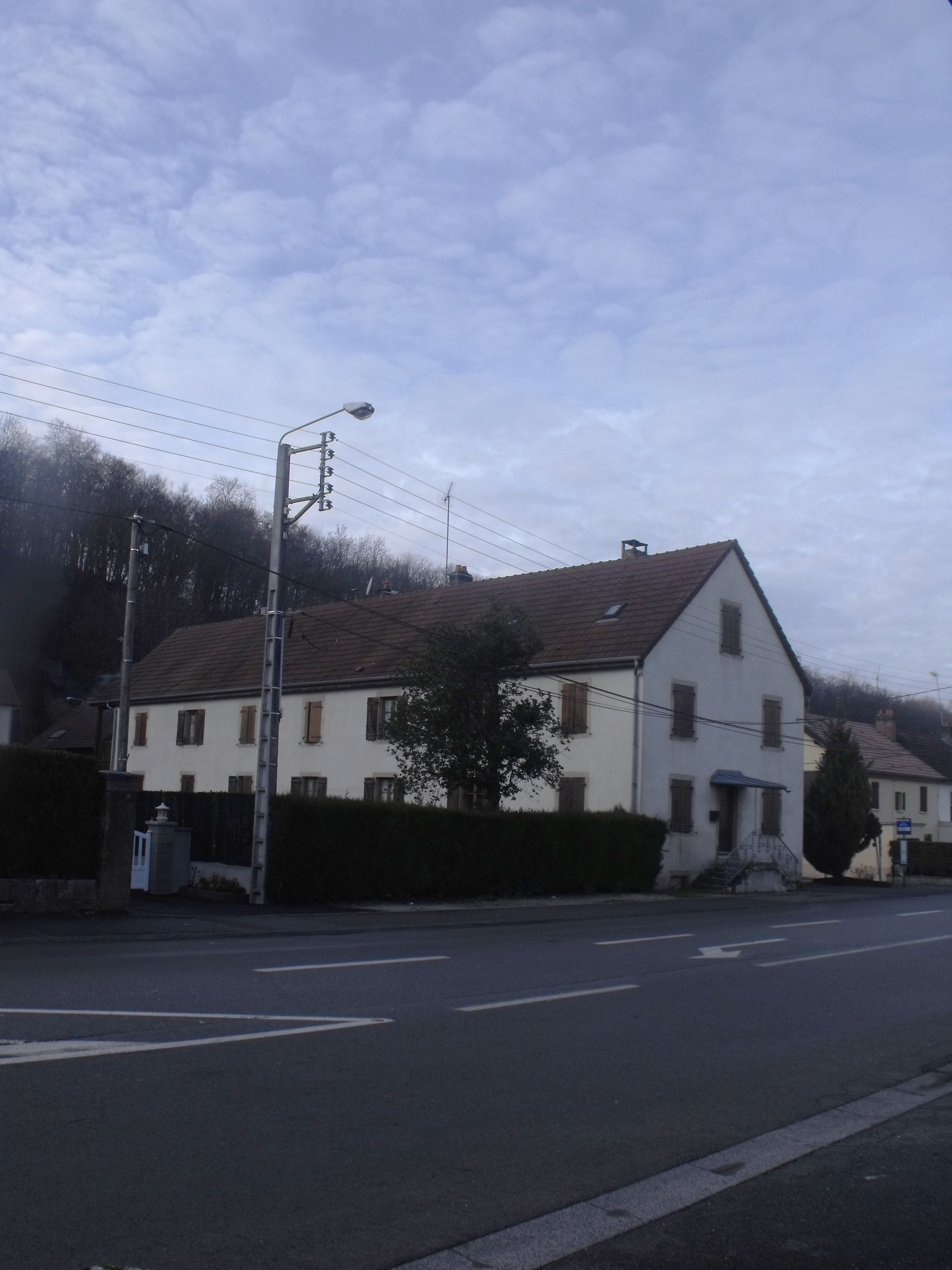 Bâtiment d'habitation ouvrière dit La Bastille, Hérimoncourt, Doubs, France